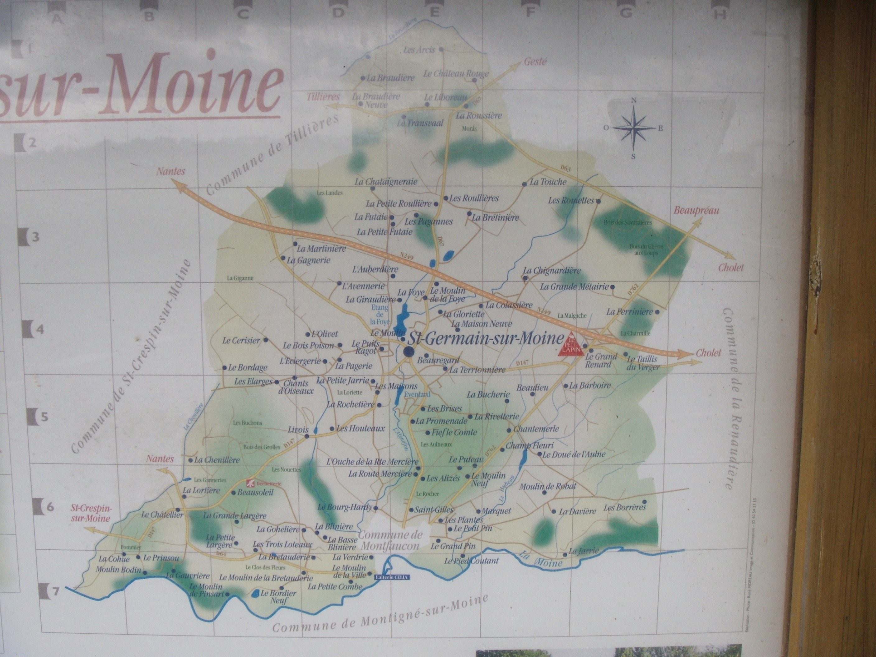 photographie du plan de la commune de Saint-Germain-sur-Moine, sur le panneau à l'entrée du parc d'activités du Val-de-Moine